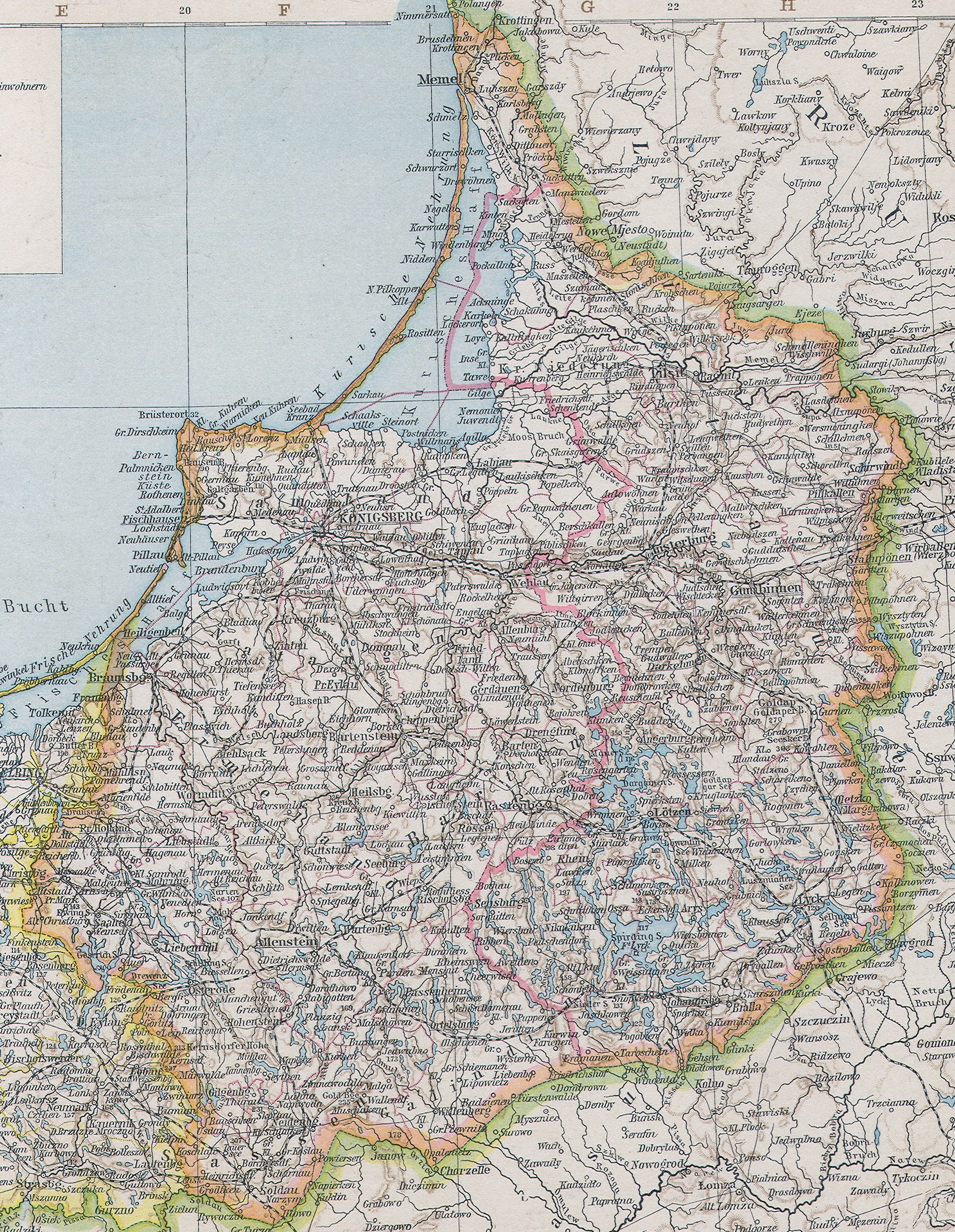 Karte von Ostpreußen 1890